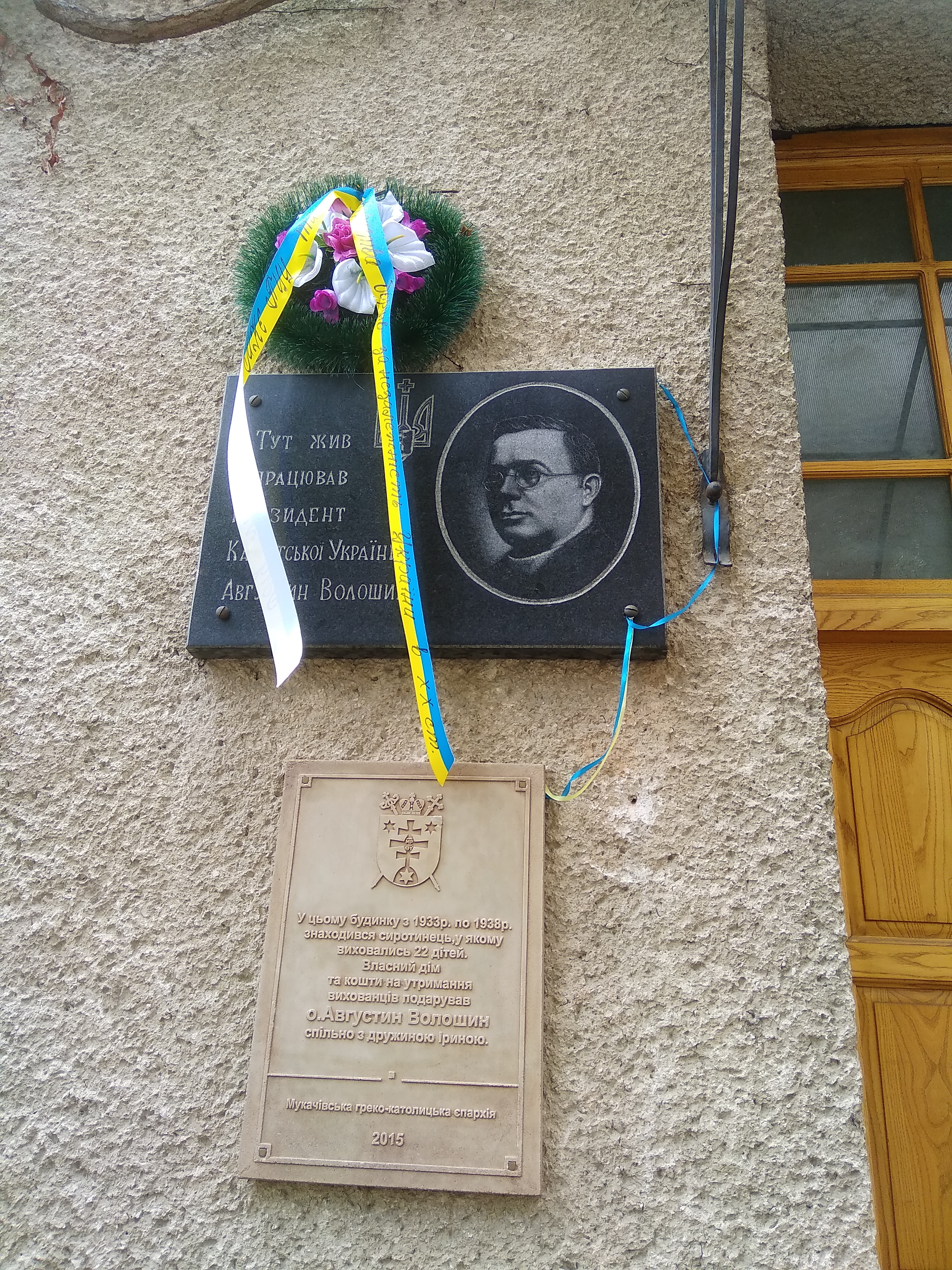 Будинок, в якому жив і працював закарпатський культурний і політичний діяч А. Волошин, Ужгород, вул. Волошина, 36